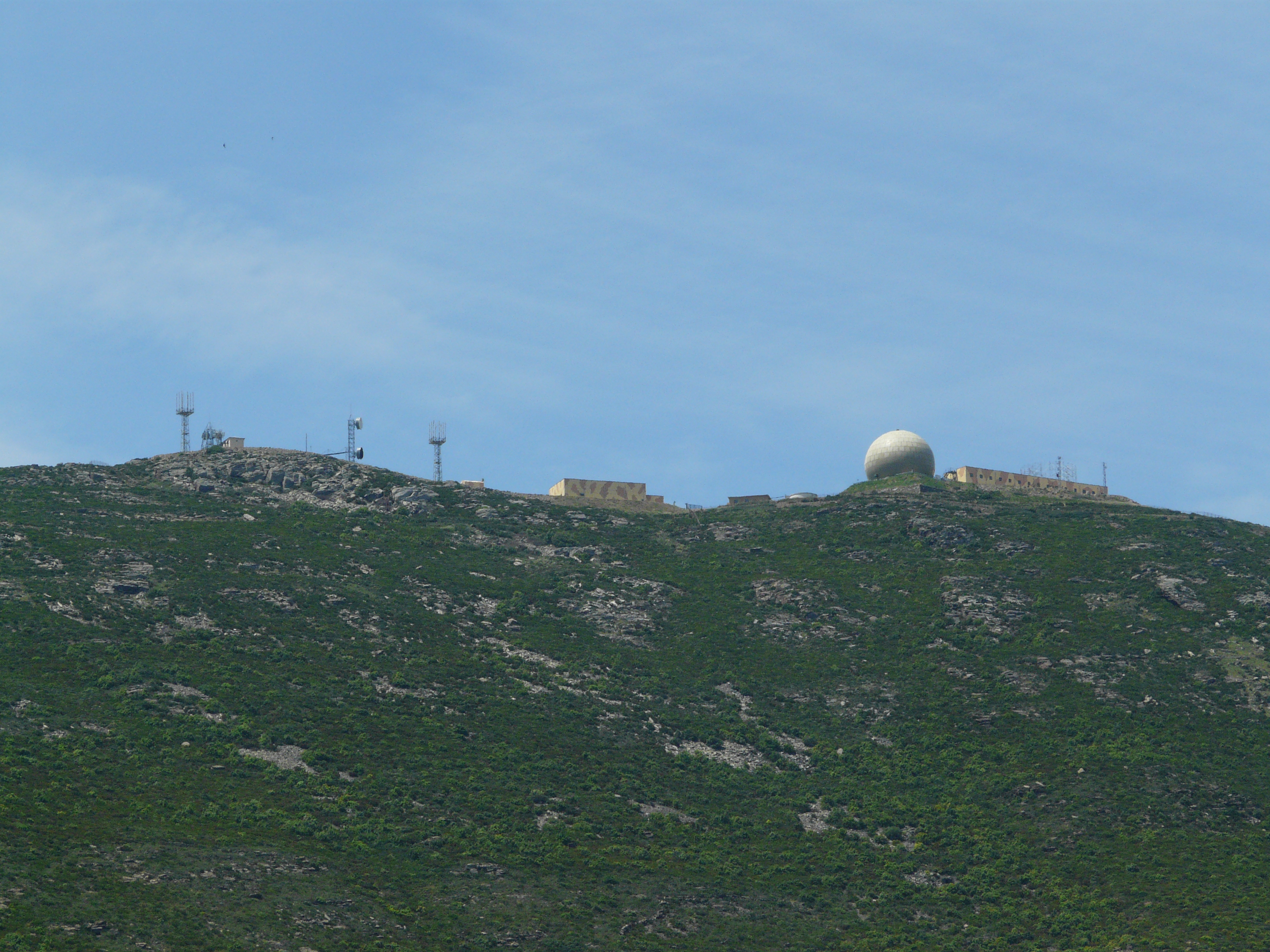 el Pení (Alt Empordà) (Cadaqués). Serra de Rodes. This is a a photo of an emblematic summit in Catalonia, Spain, with id: CE-315083006 Object location42° 16′ 55.39″ N, 3° 14′ 37.67″ E